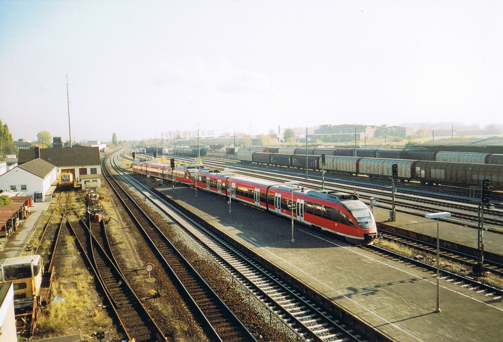 RB 23 Einfahrt in Bahnhof Euskirchen Sicht aus Stellwerk